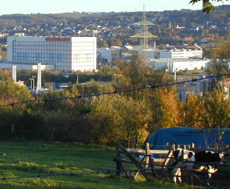 Möbelhaus Ostermann in Witten-Rüdinghausen, im Vordergrund das Auslieferungslager; Freileitungsmast (Bl. 4317)